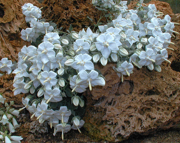 Campanule (Campanula troegerae) vivace de Turquie de 15 à 20 CM sur falaises calcaire.